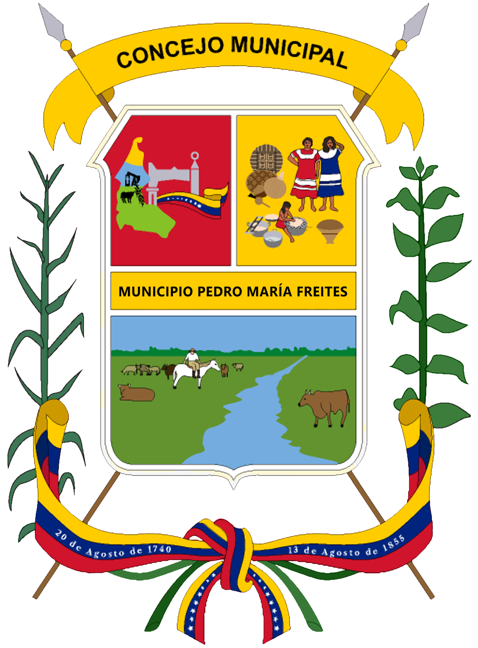 Escudo del Municipio Pedro María Freites (Anzoátegui)